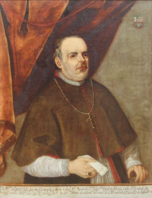 Retrato de José Sancho Granado (1681-1748). Fue colegial del Colegio Mayor de San Ildefonso de Alcalá de Henares, en tres ocasiones fue rector de la Universidad de Alcalá entre los años 1705 y 1712, en 1714 fue nombrado canónigo en la Iglesia Magistral, y en 1724 obtuvo la cátedra de Vísperas de Teología en la Universidad de Alcalá. En 1725 fue nombrado abad de la Colegiata de Santander, y entre 1730 y 1748 fue obispo de Salamanca. El cuadro actualmente pertenece a D. José Garreta Sáncho Granado, que lo ha cedido al Ayuntamiento de Arganda del Rey por un plazo de 50 años.[1][2]